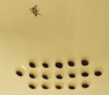 Fliege auf der Toilette